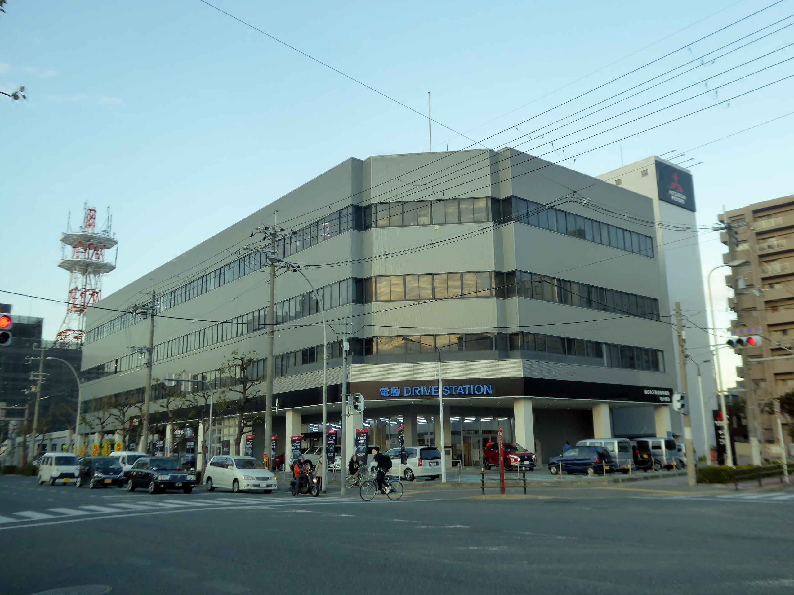 西日本三菱自動車新大阪店を撮影。